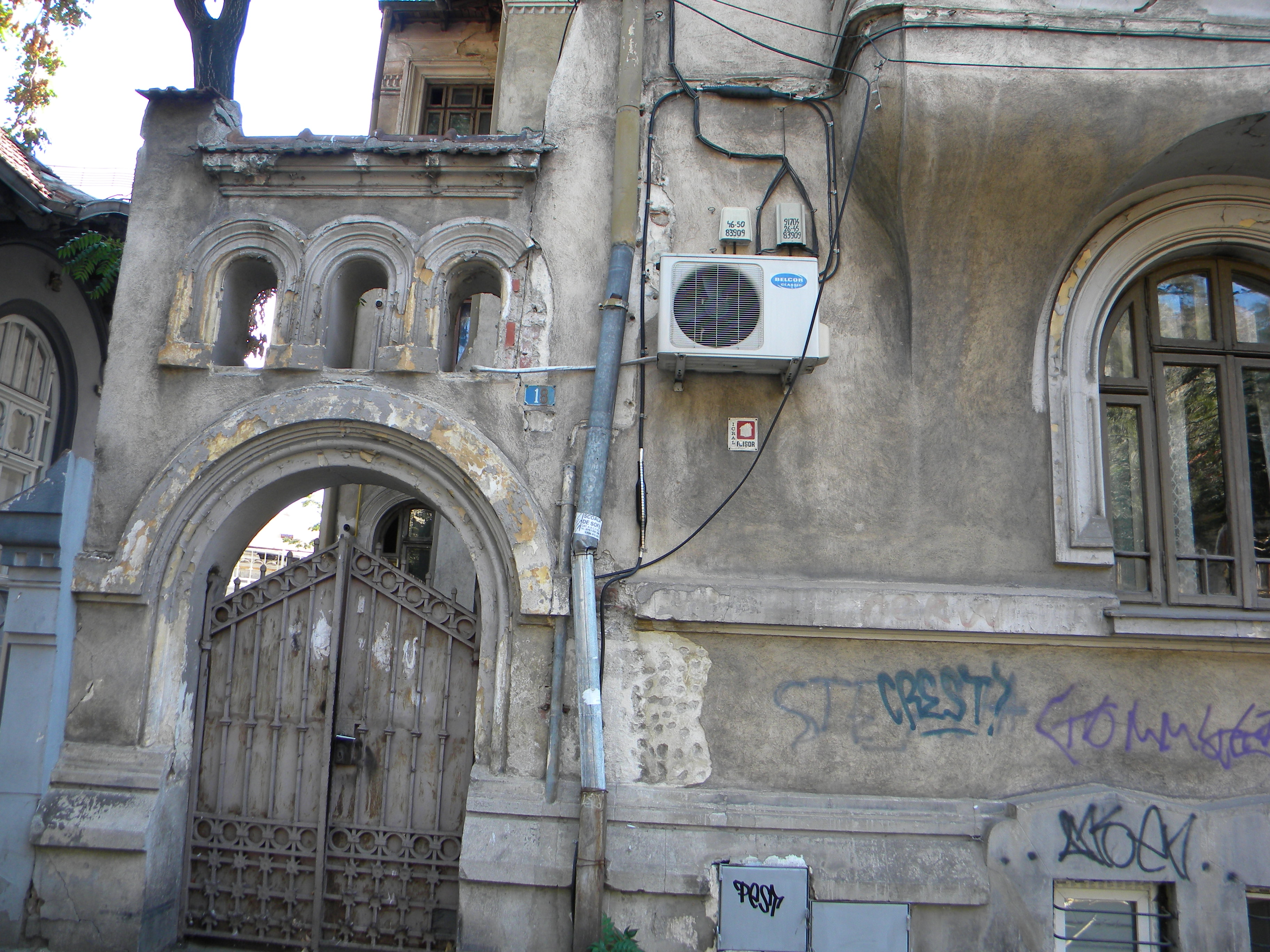 Imobil pe Bd. Pache Protopopescu nr. 18 (detaliu)